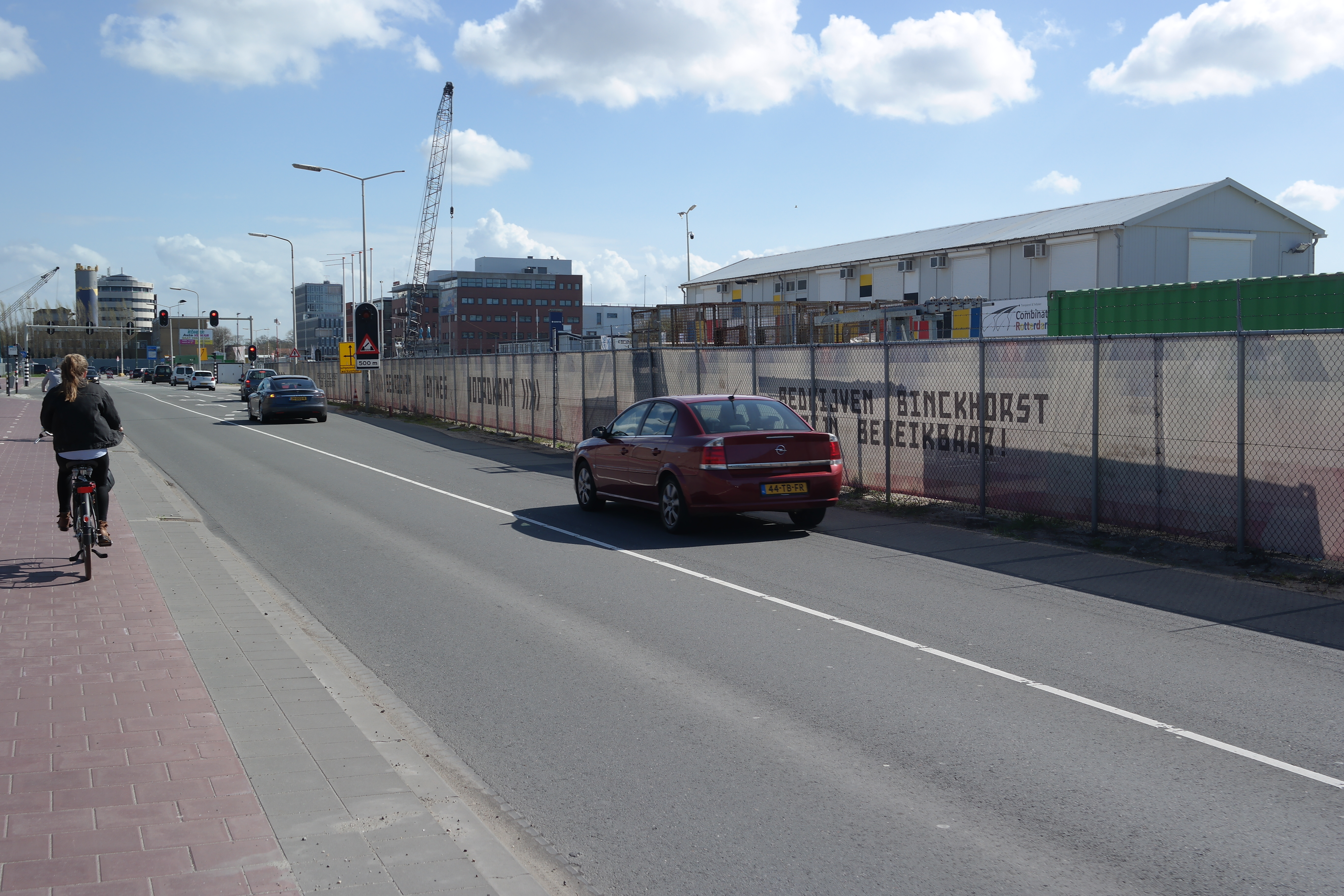 De Binckhorstlaan in Den Haag, met werkzaamheden aan de Rotterdamsebaan.